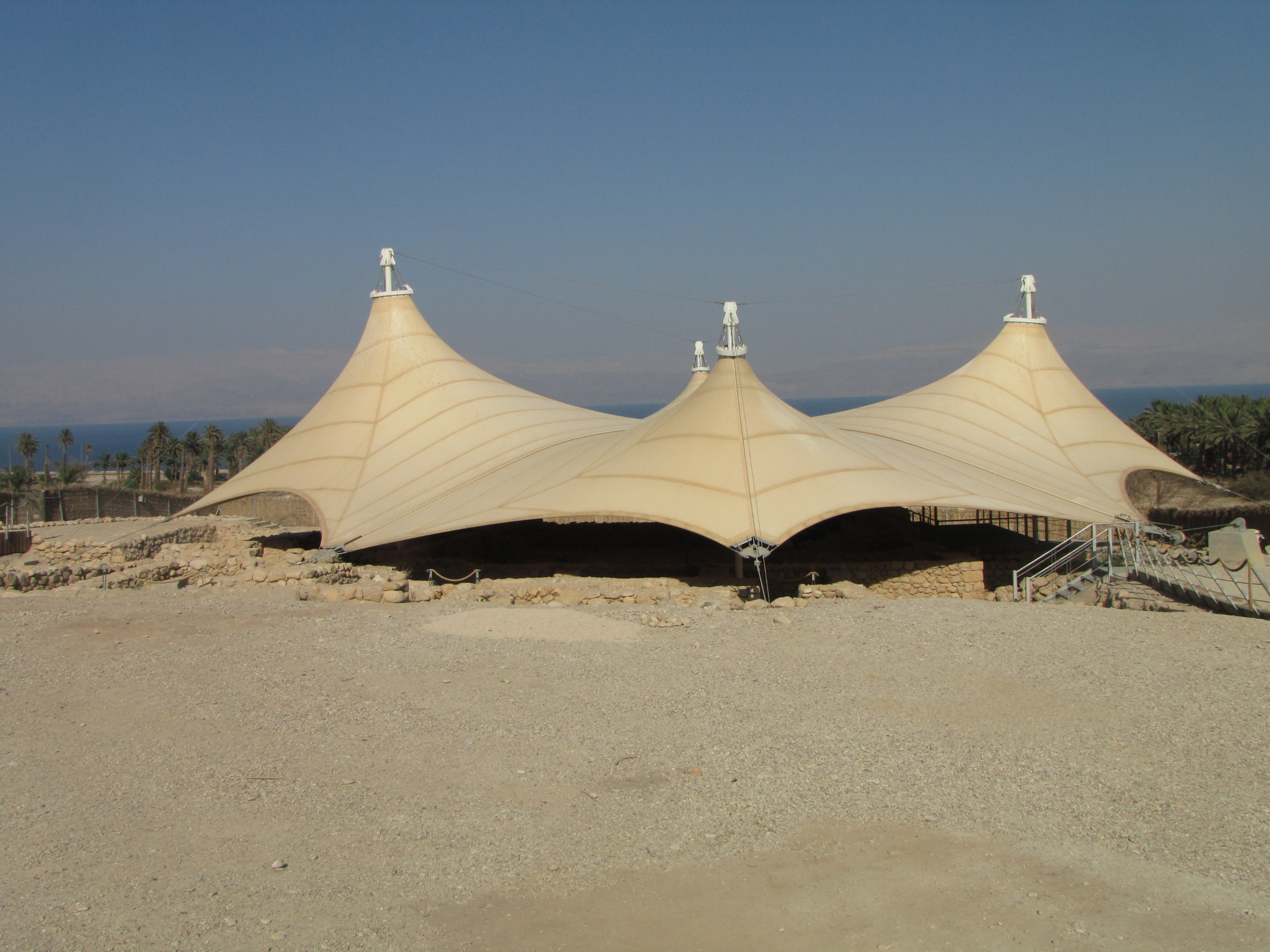 En Gedi, Synagoge.